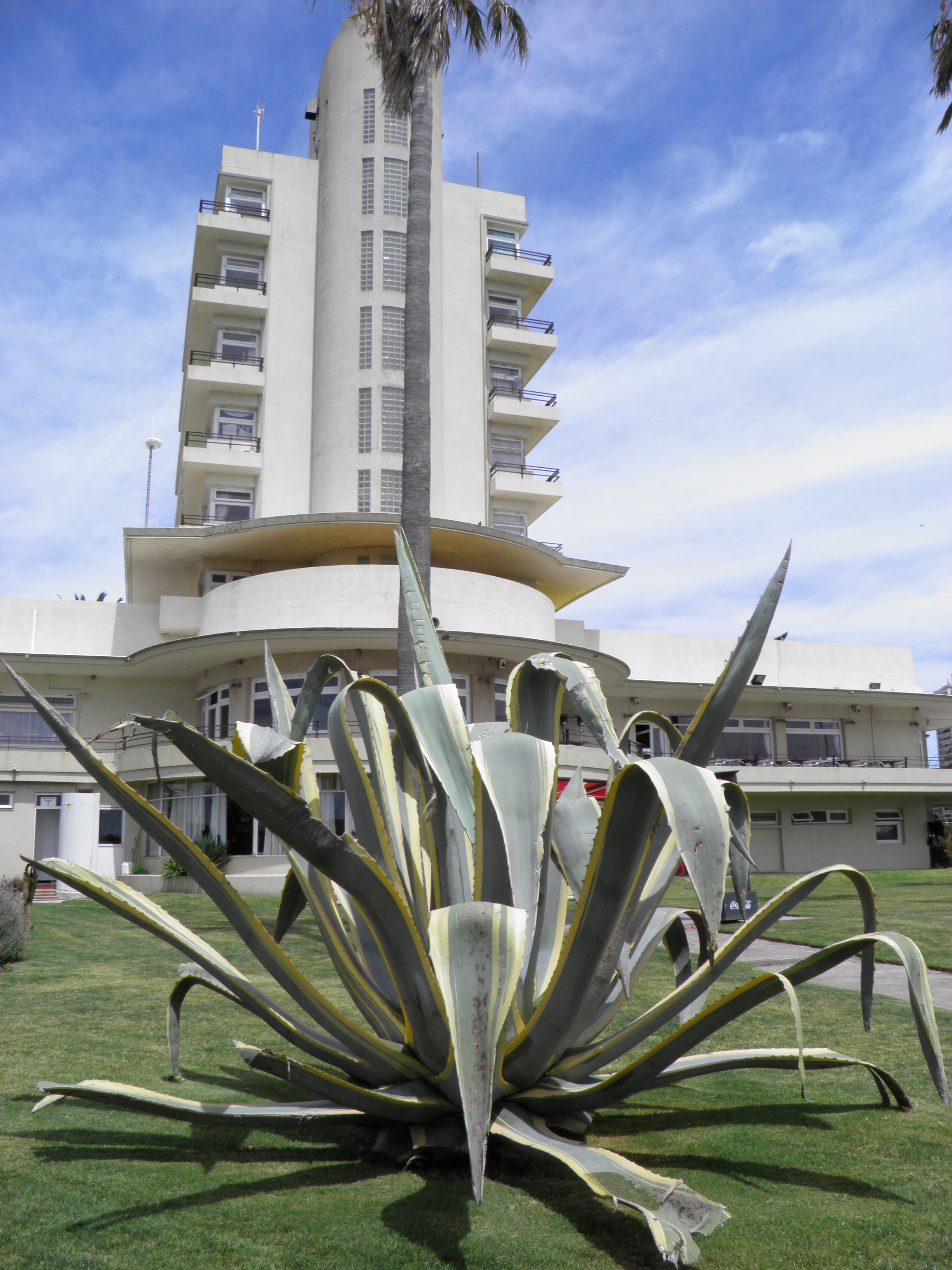 Parte de atrás del Edificio del Yacht Club. Ubicado en el departamento de Montevideo